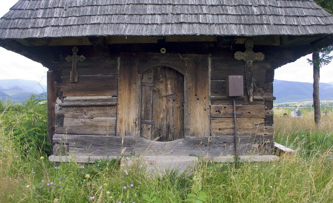 Stânceşti, Bihor, biserica de lemn faţada de vest, intrarea.